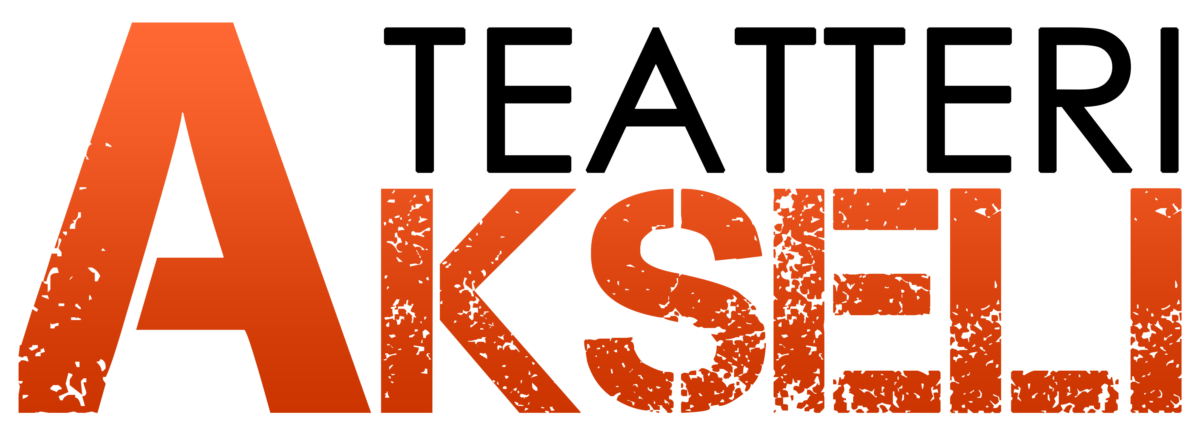 Logo